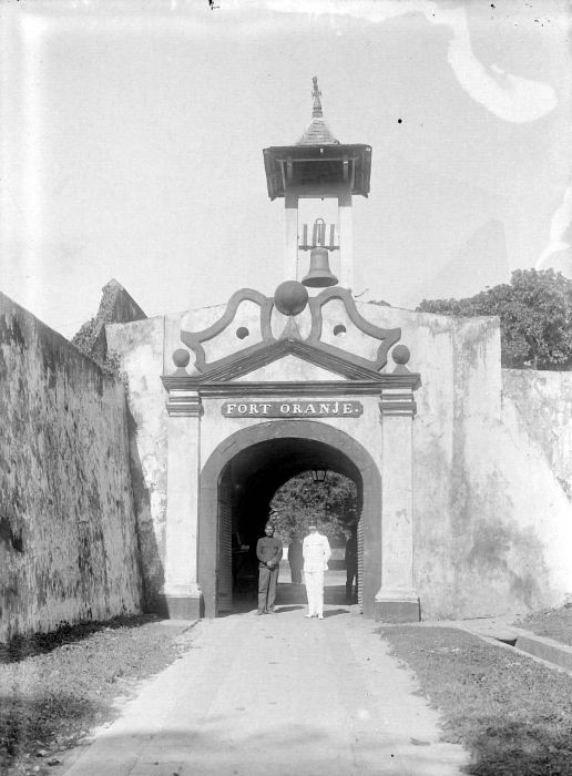 Negatief. Ingang van fort Oranje, Ternate